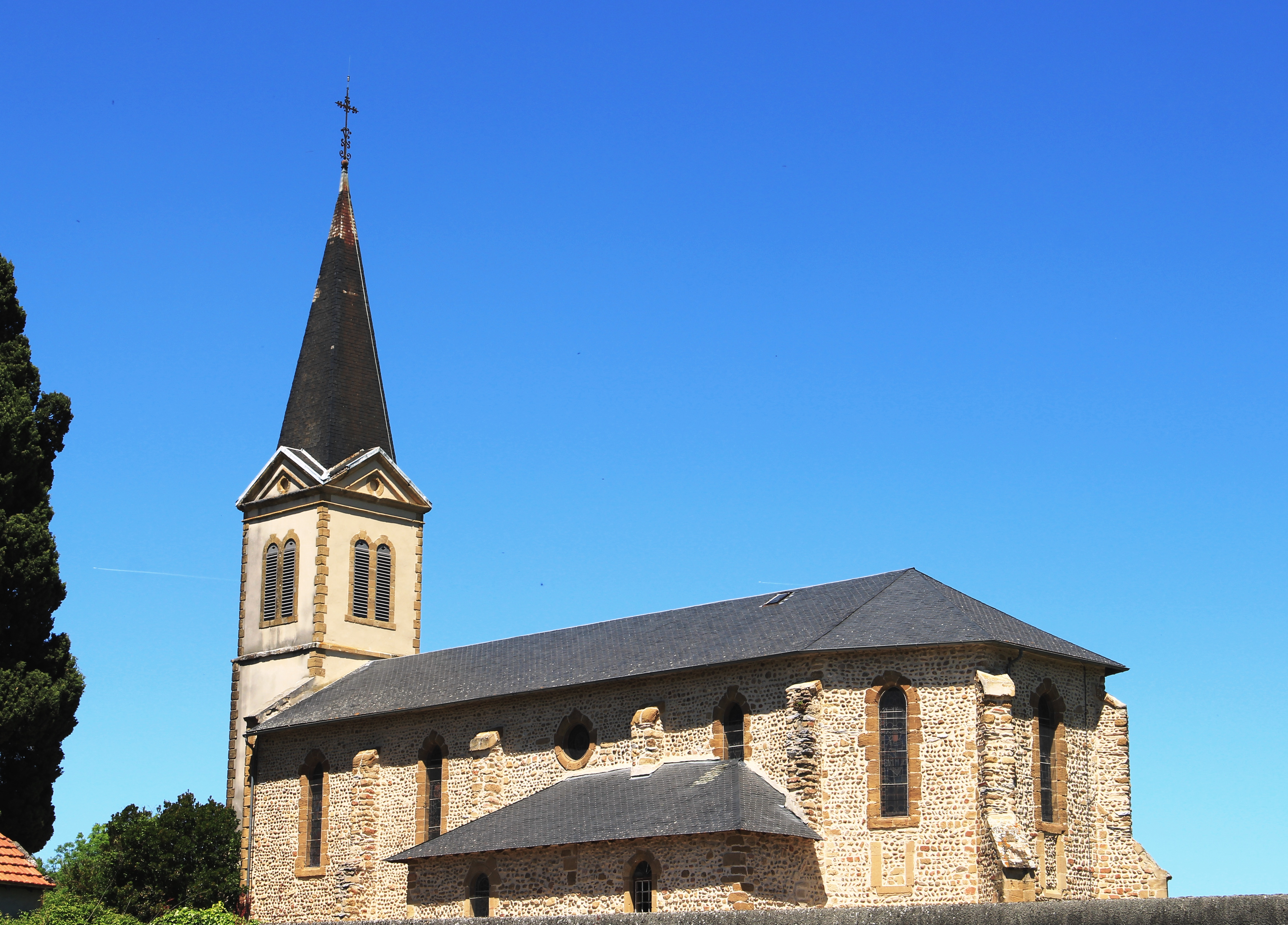 Église Saint-Ours de Sentous (Hautes-Pyrénées)